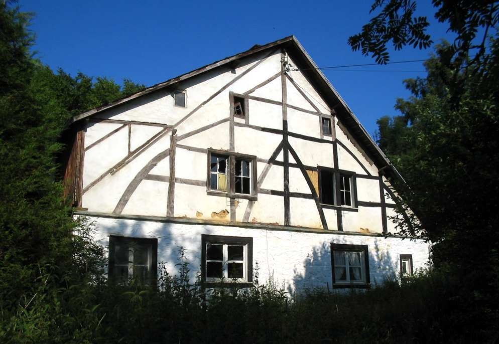 Maison en pans-de-bois et torchis (terre crue) à Malmedy (Bévercé). Exemple d'ossature dit "à portique". Patrimoine immobilier détruit en 2015, la Ville de Malmedy ayant délivré un permis de démolition.